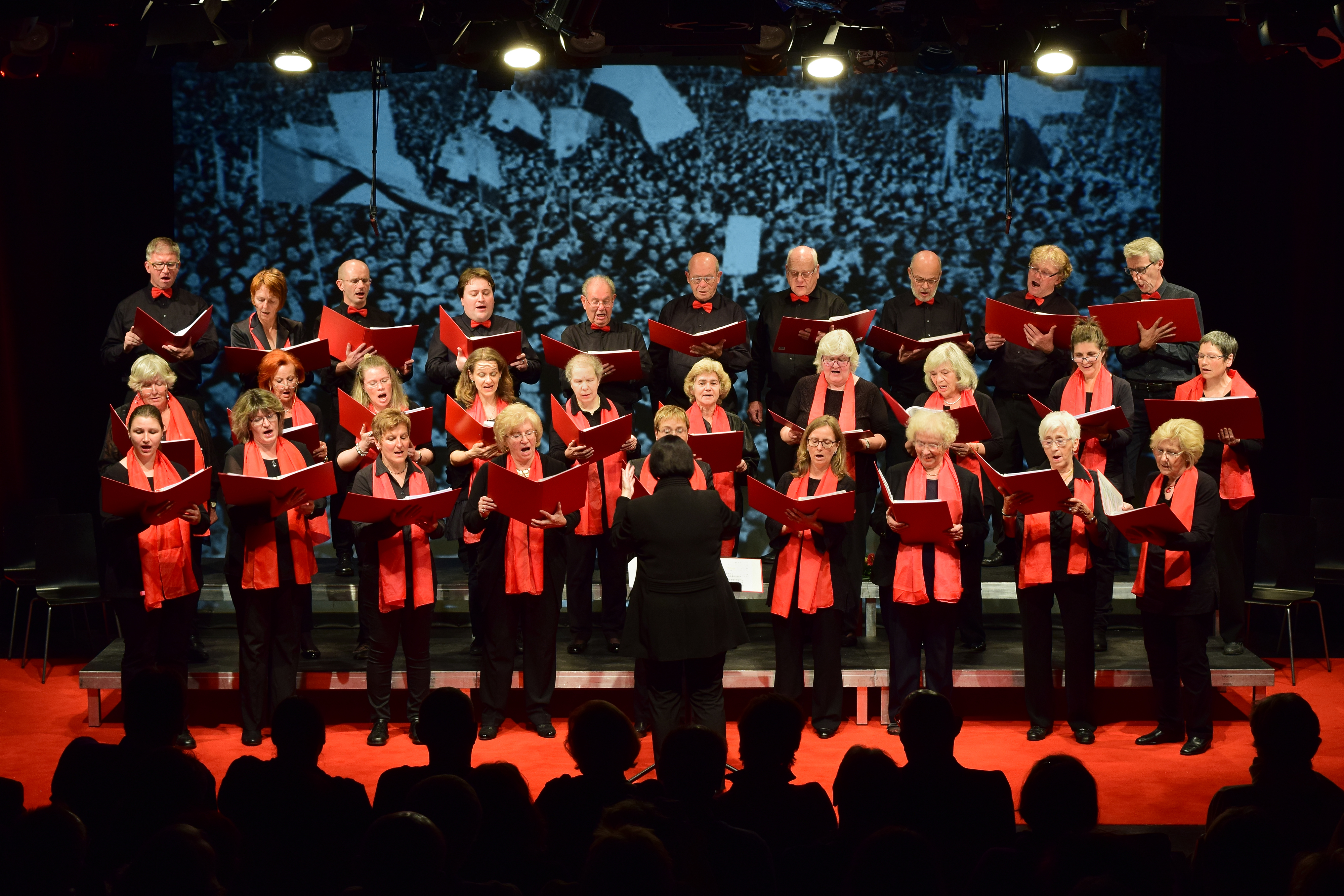 Festkonzert "Zukunft (m)einer Welt" der Wiener Arbeitersänger (Projektchor) anlässlich 125 Jahre Österreichischer Arbeitersängerbund am 31. Oktober 2016 im Rabenhoftheater.[1] (Das österreichweite Festkonzert des ÖASB, "Singen baut Brücken", fand vom 13. bis 15. Mai 2016 in Bruck an der Mur statt, davon haben wir bislang leider kein Foto.)